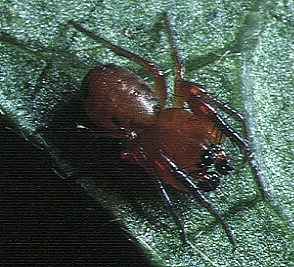 male Hypsosinga pygmaea from Okinawa.